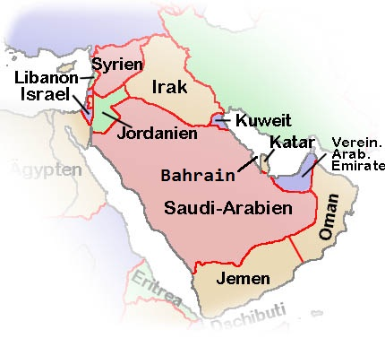 Politische Asien-Karte Copyright 2001-3 Brion L. Vibber These are primarily intended for use in the Wikipedia free encyclopedia project. Fill in the country names etc. for your target language, size to taste, and use as you wish.